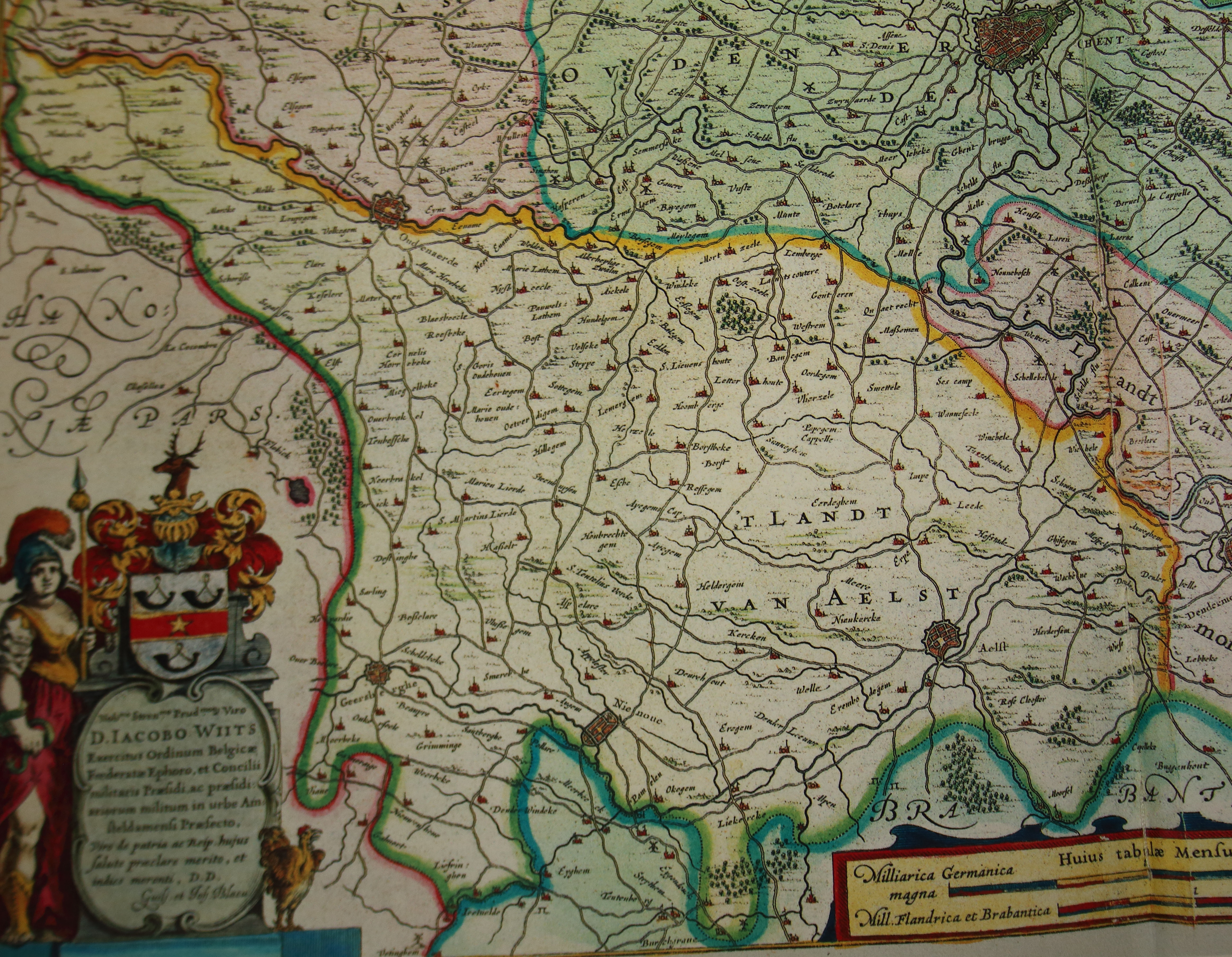 Land van Aalst, Atlas Maior, Joan Blaeu, 1665.